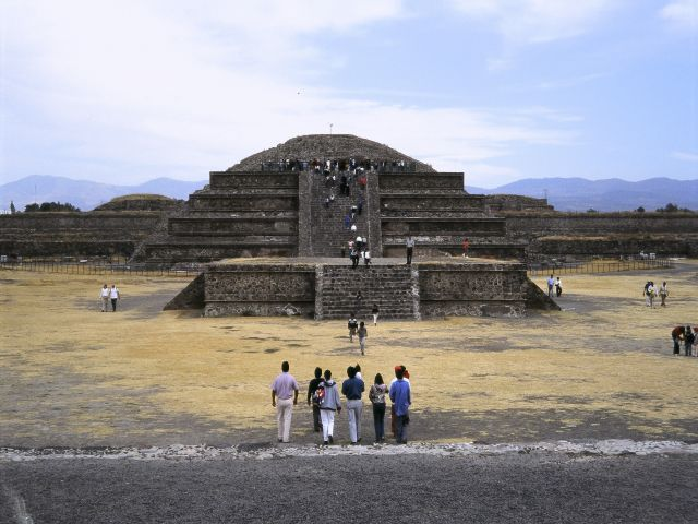 Teotihuacan, Estado do México, México; Foto obtida em Fevereiro de 2004.